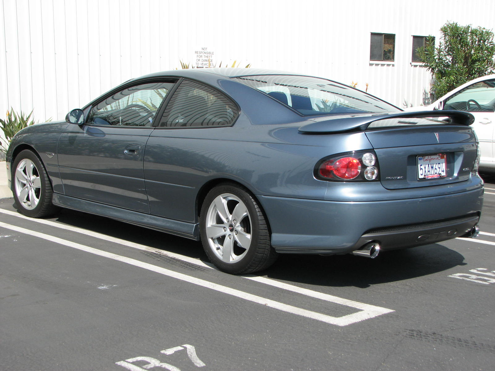 Pontiac GTO 6litre V8